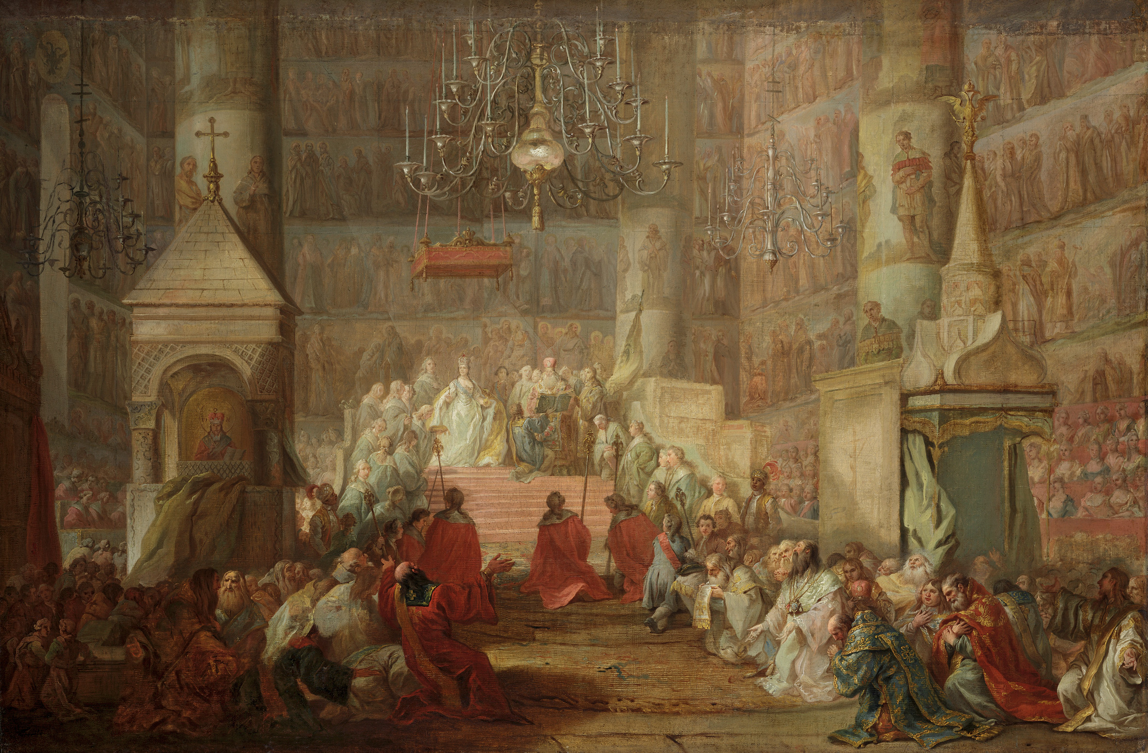 1. Торелли С. «Коронование Екатерины II». 1777. Холст, масло. 83,8х125,8